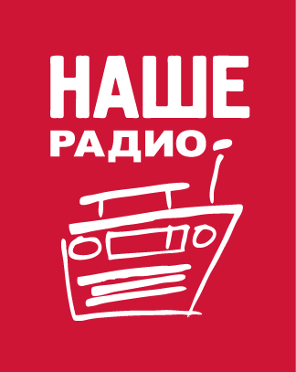 Логотип НАШЕ РАДИО